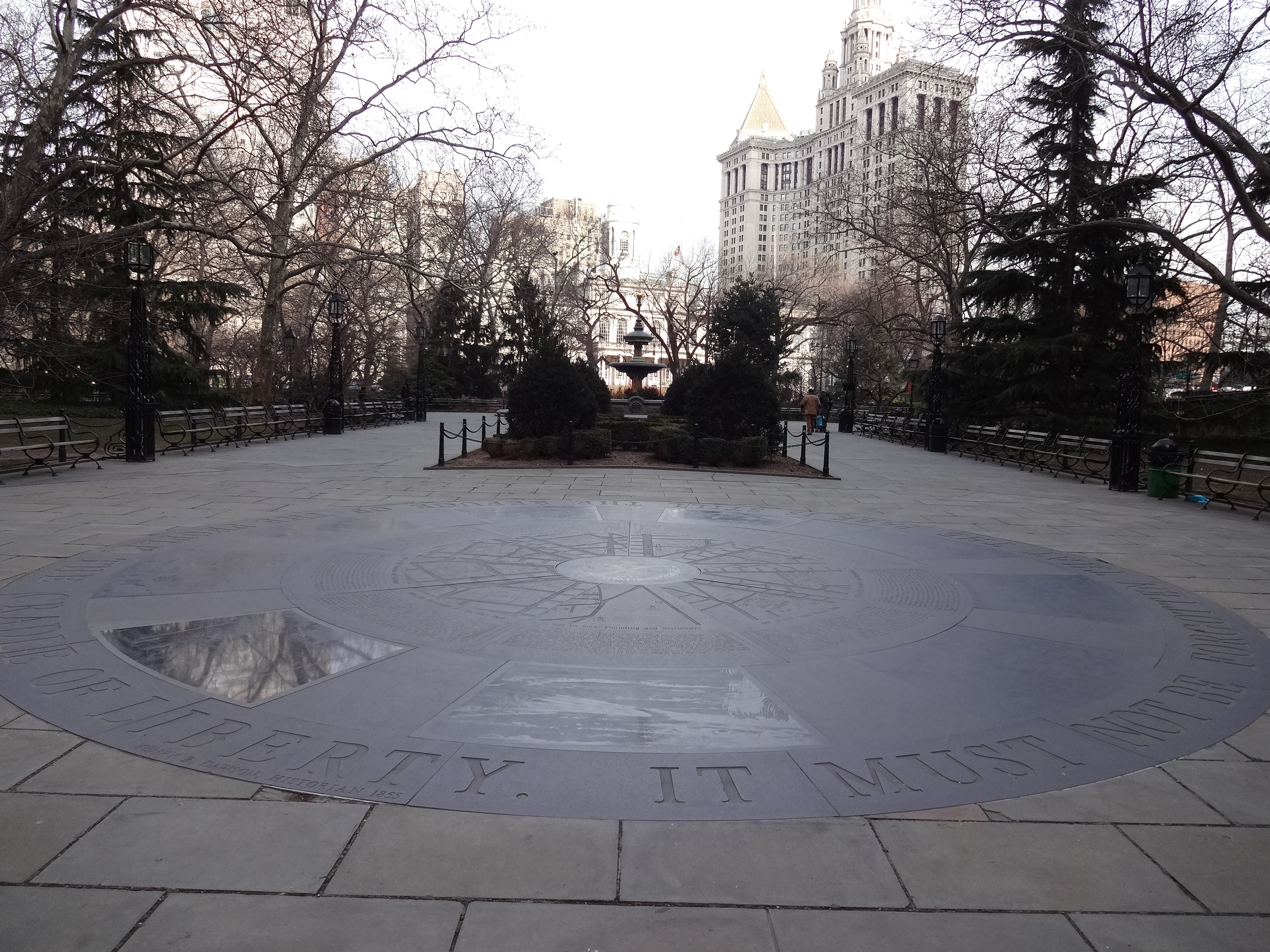 Praça em Nova Iorque.